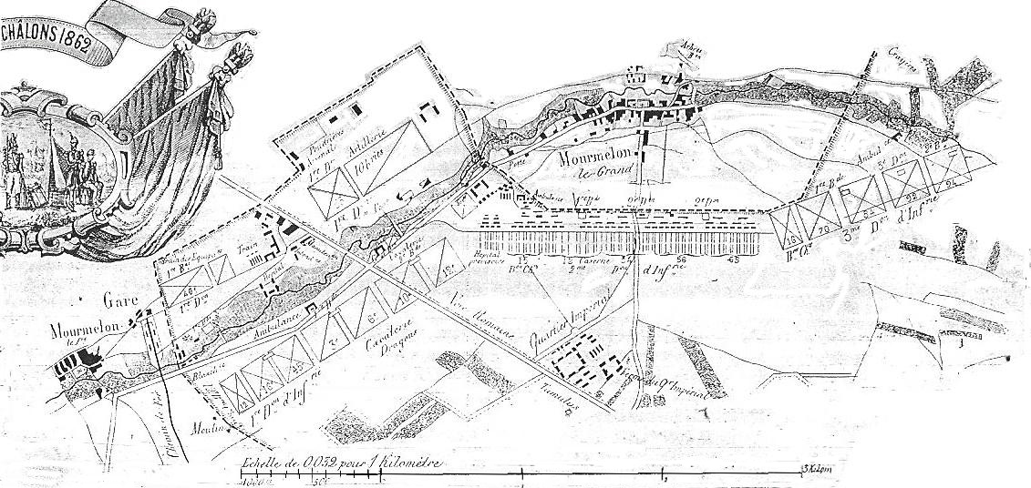 Camp_de_Châlons, un_plan_de_1862.